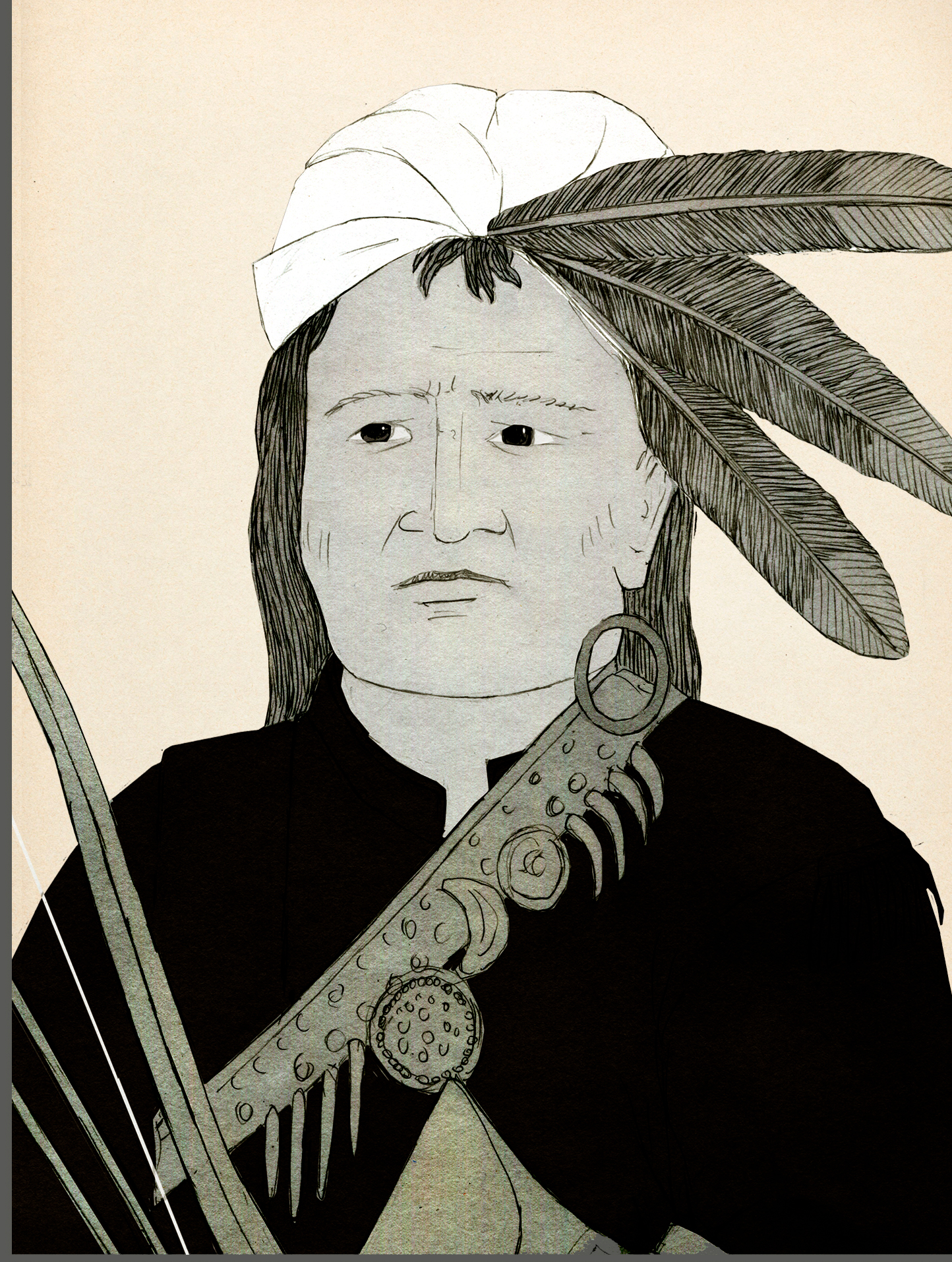 Imatge del jefe indi Chief Okemos